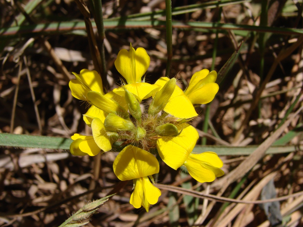 Eriosema campestre Benth. - FABACEAE - Poço Azul - Brazlândia - Distrito Federal - Brasil.